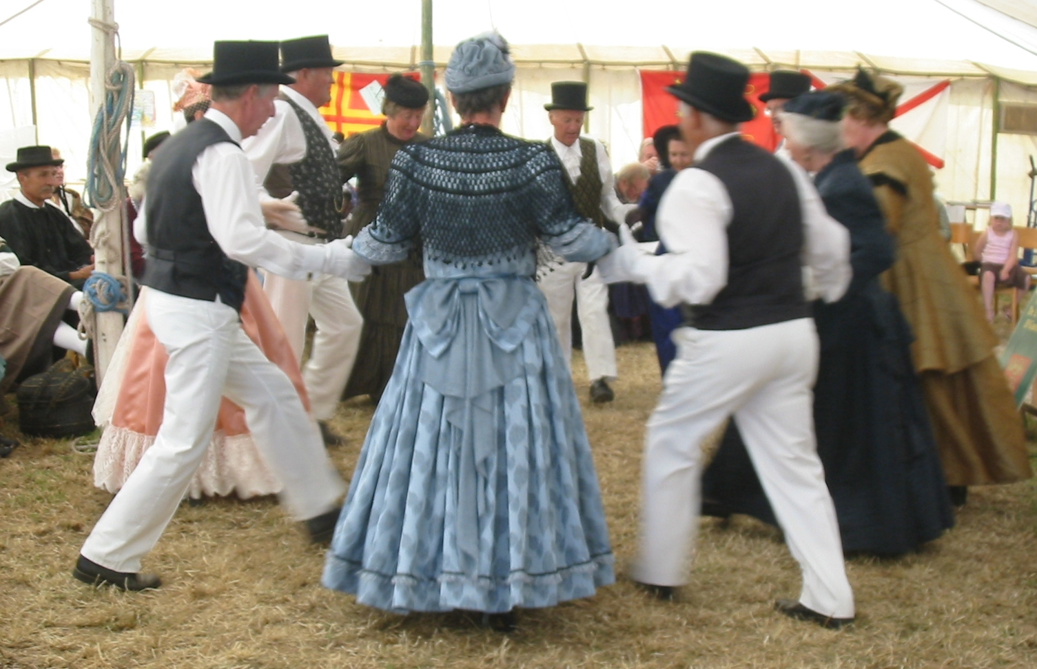 Norman traditions at La Fête des Rouaisouns in Guernsey, June 2006. Guernsey traditional dancers